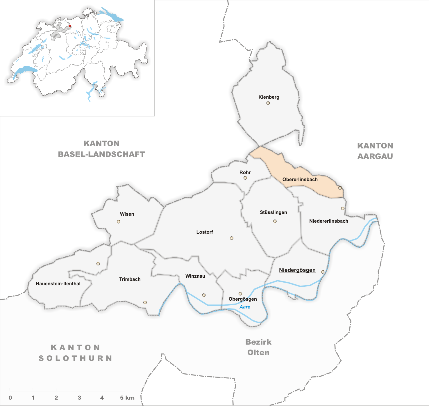 Municipality Obererlinsbach Artist: Tschubby